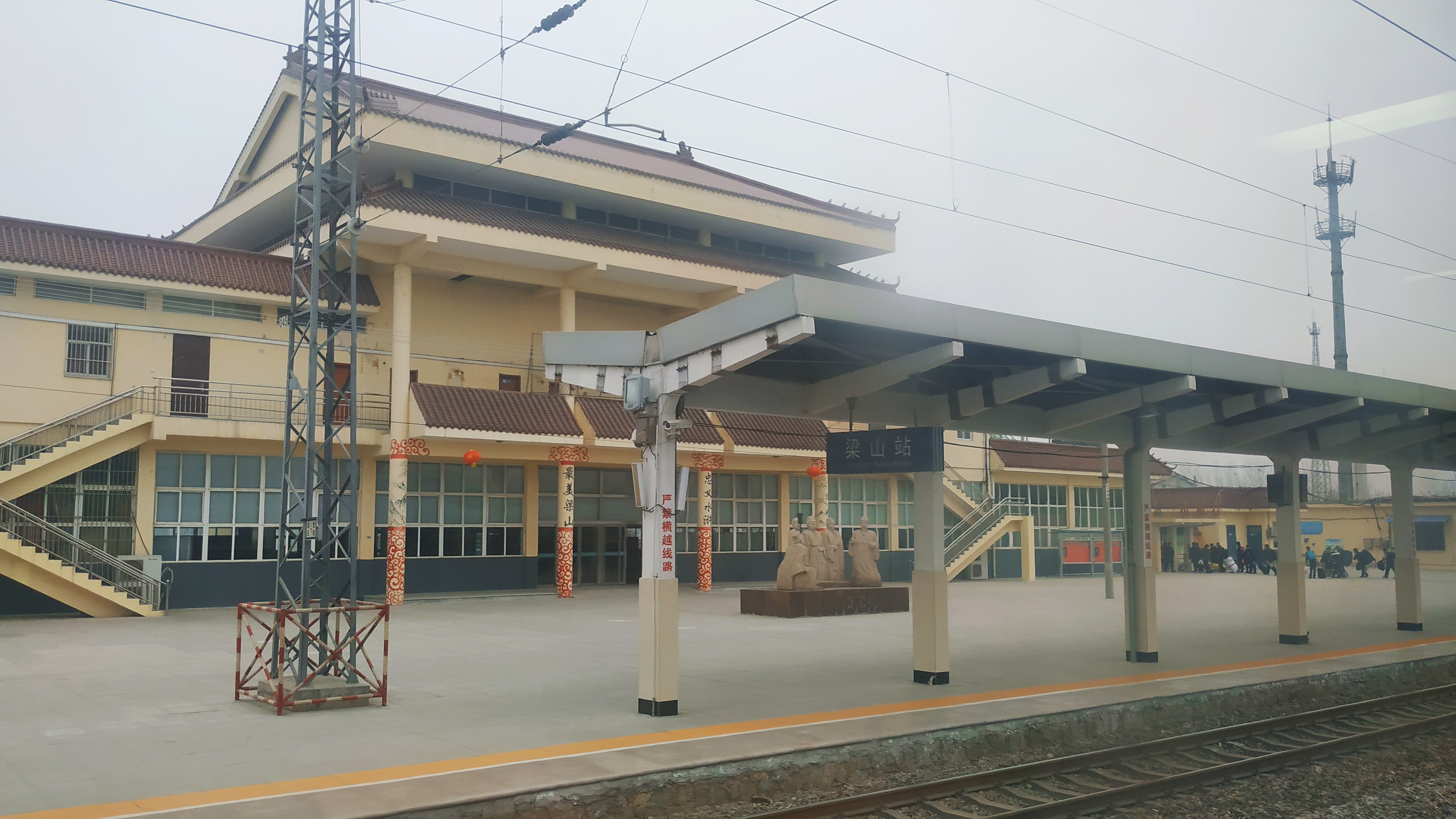 中文（中国大陆）: 山东梁山站